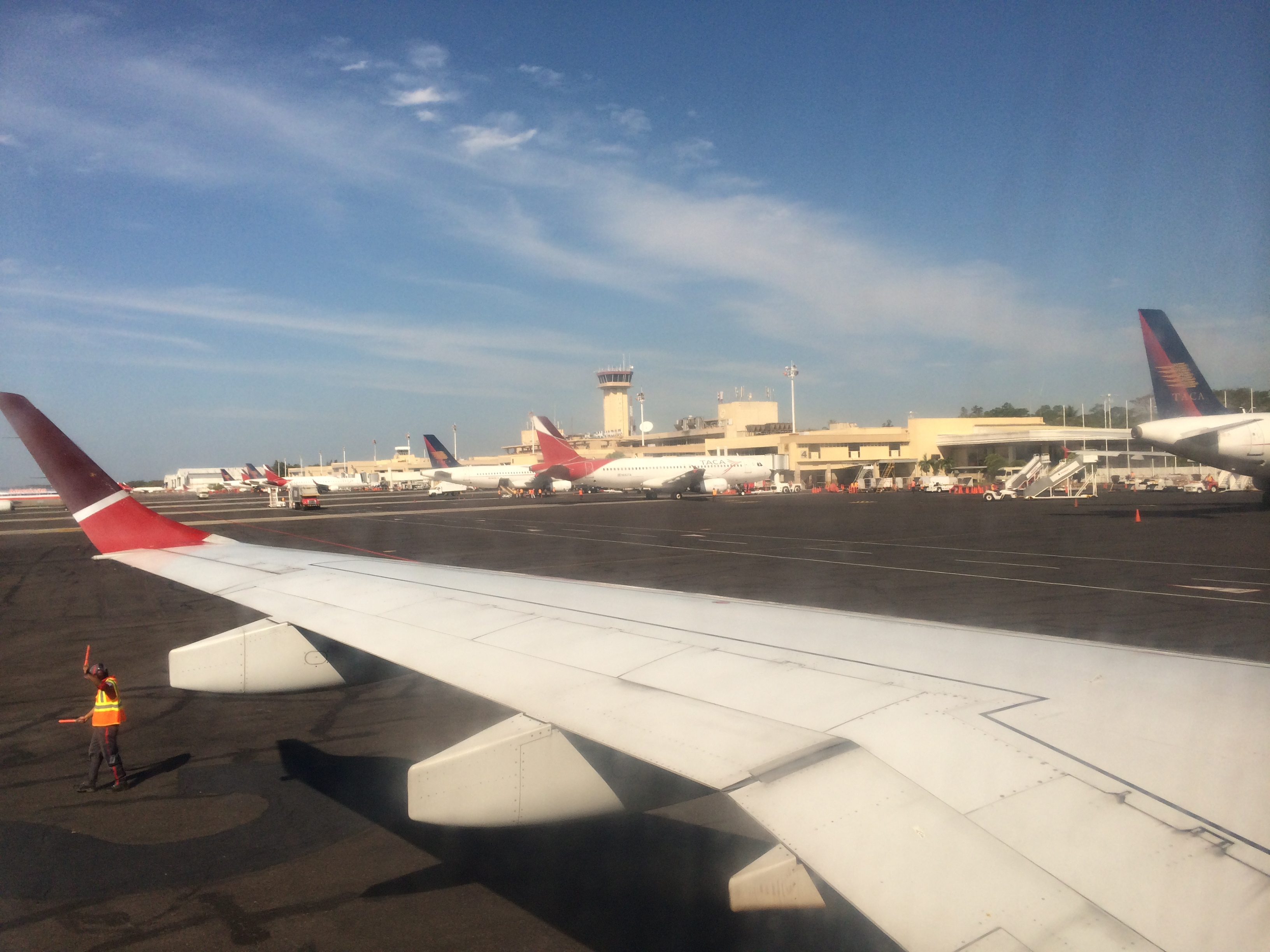 Aviones de Taca en el Aeropuerto Internacional de El Salvador.